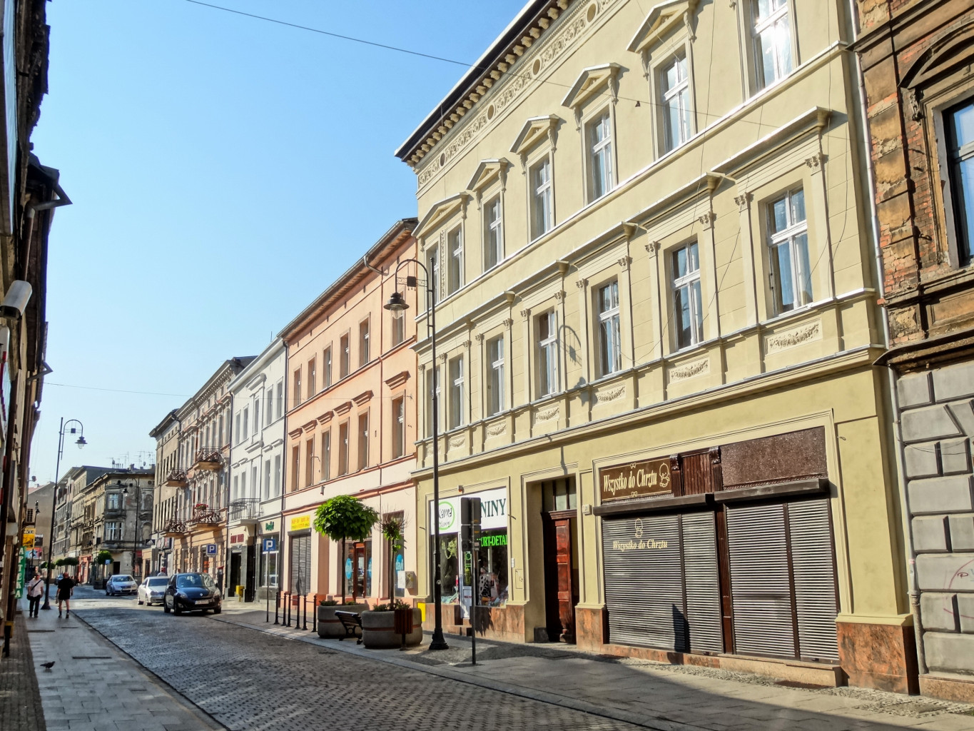 Ulica Dworcowa w Bydgoszczy na odcinku od ul. Warmińskiego do ul. Królowej Jadwigi